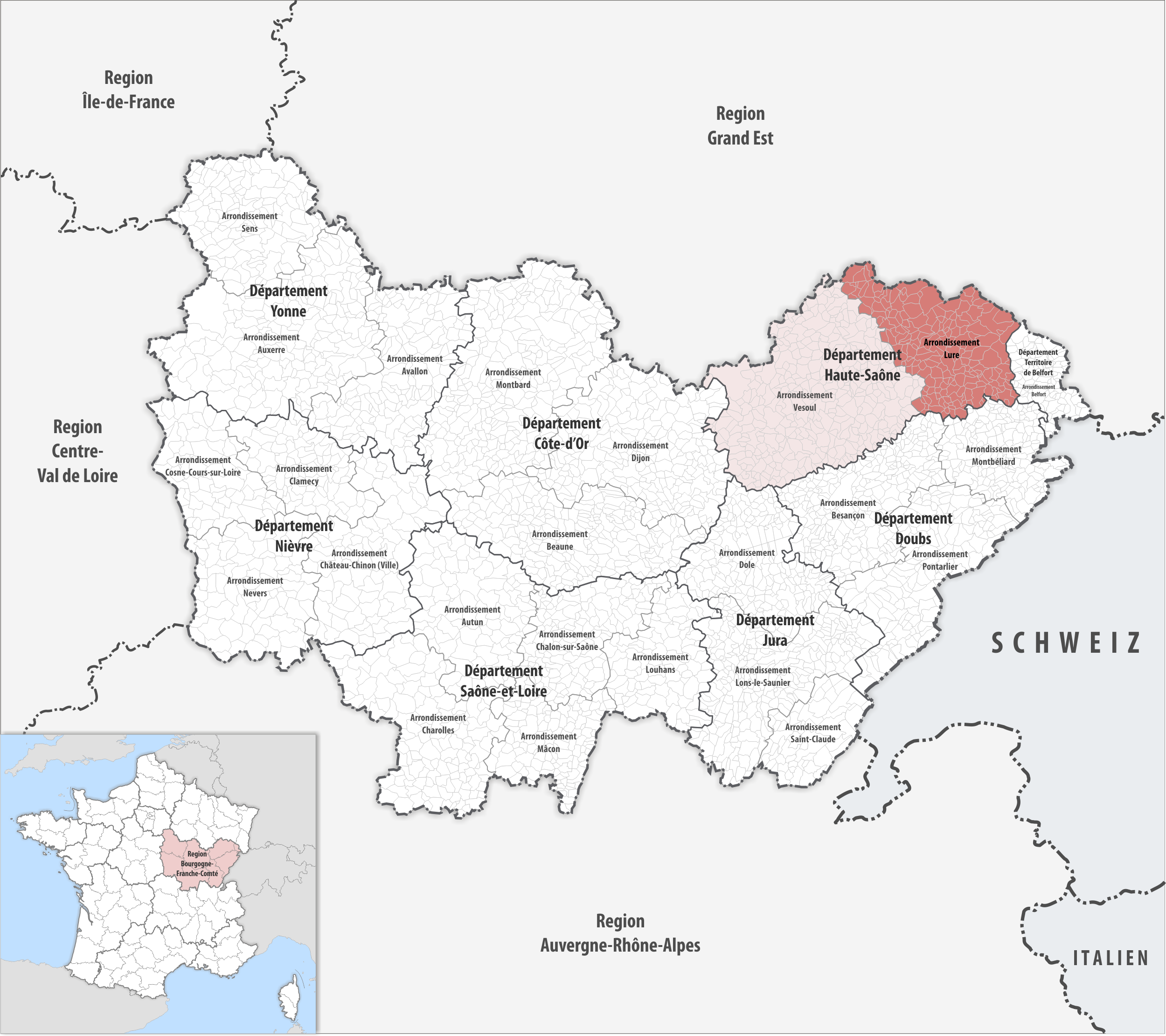 Lage des Arrondissements Lure